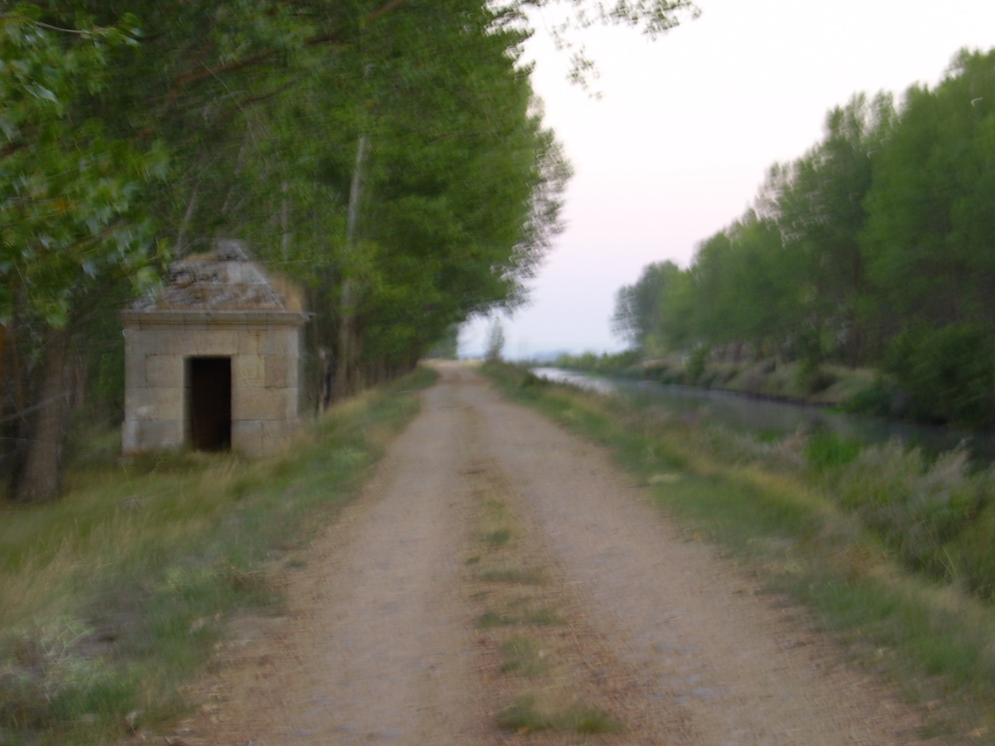 Camino de sirga y almenara de riego a su paso por Cabañas